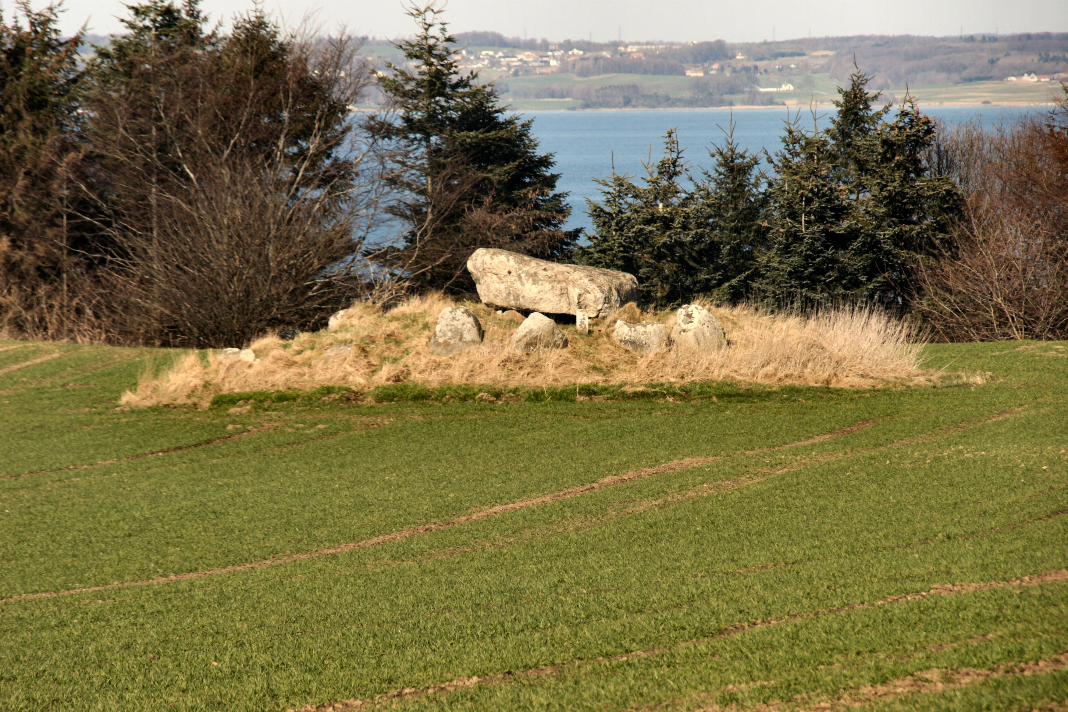 Agri Dyssen